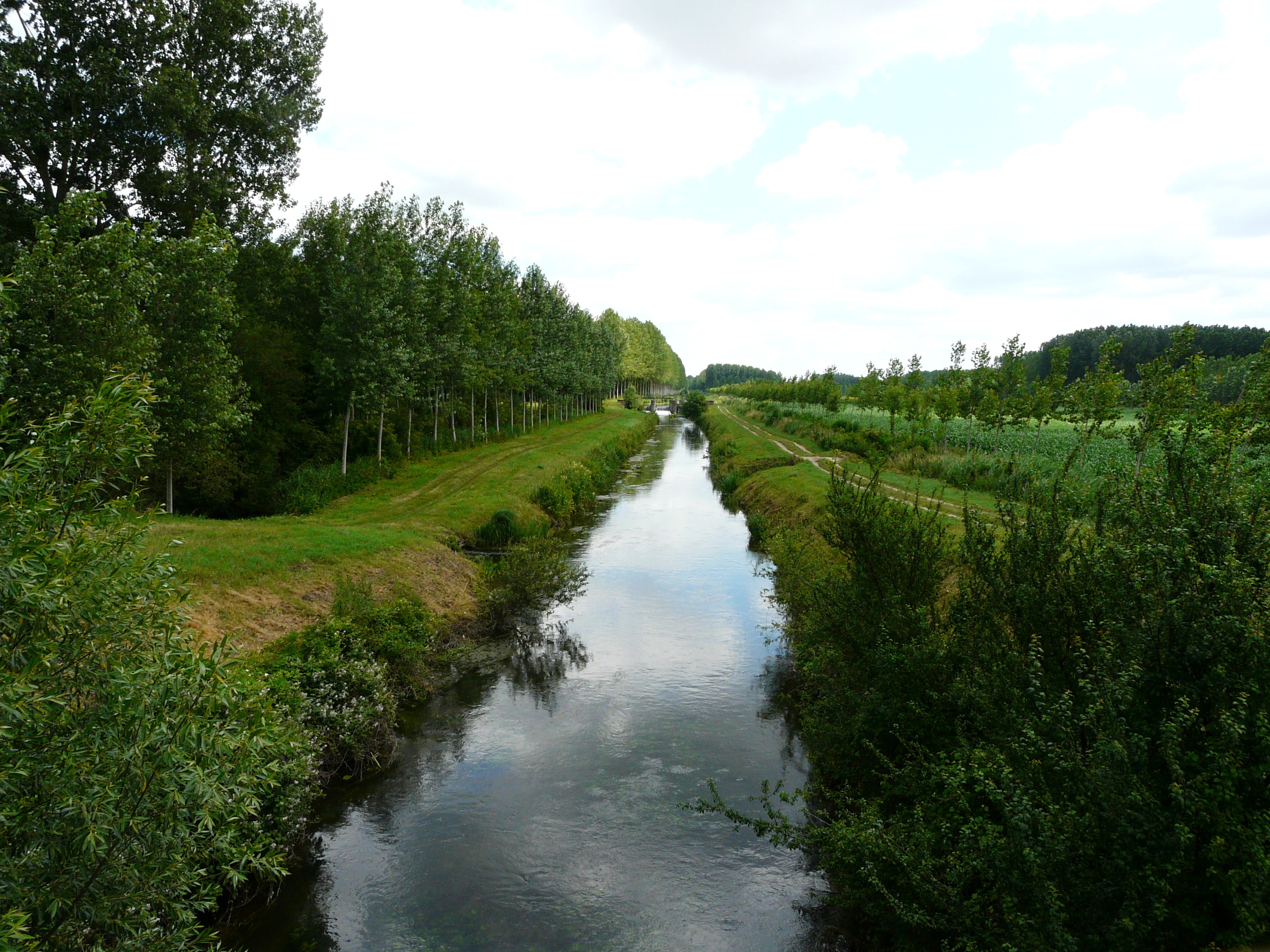 Le canal de la Dive en amont de la route départementale 39, Curçay-sur-Dive, Vienne, France